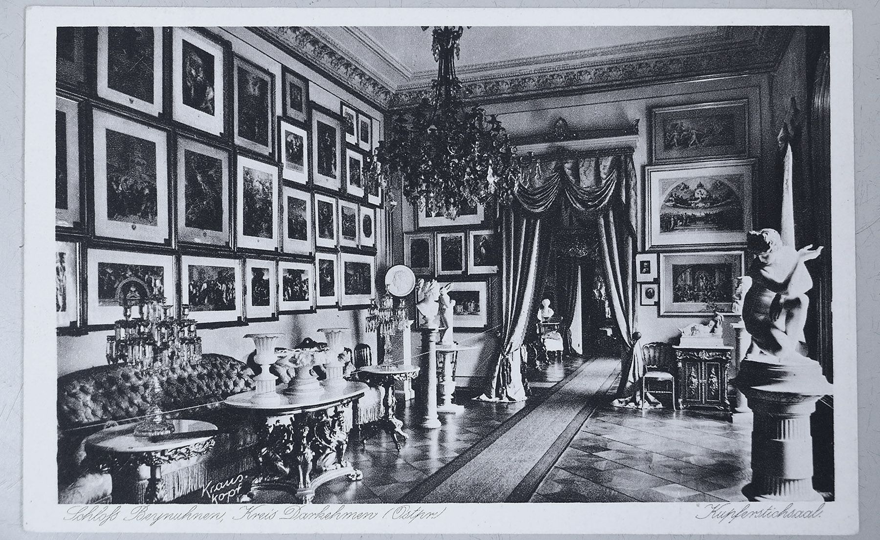 Дворец Кляйн Байнунен